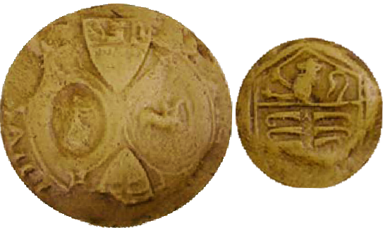 cf le titre.